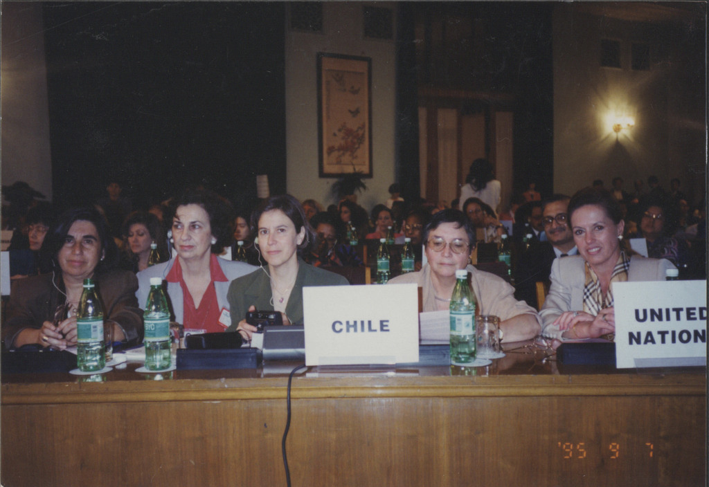 Políticas chilenas en la IV Conferencia Mundial sobre la Mujer, realizada en Beijing: María Antonieta Saa, Fanny Pollarolo, Mariana Aylwin, María Elena Carrera y María Angélica Cristi.